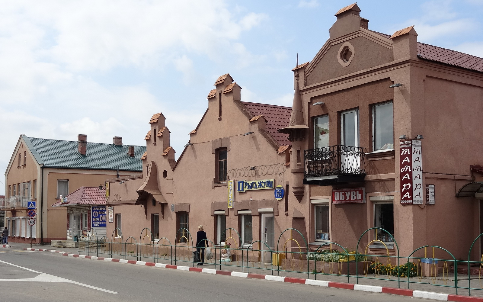 застройка площади Рынок, дома ремесленников (XVIII век)